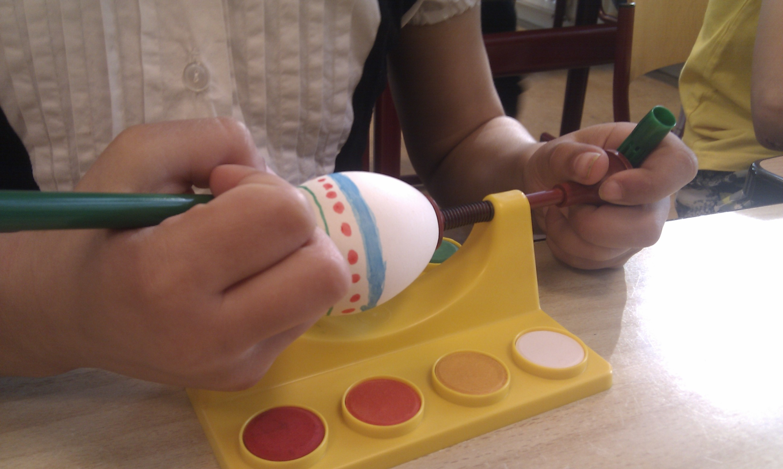 Eierverfmolen